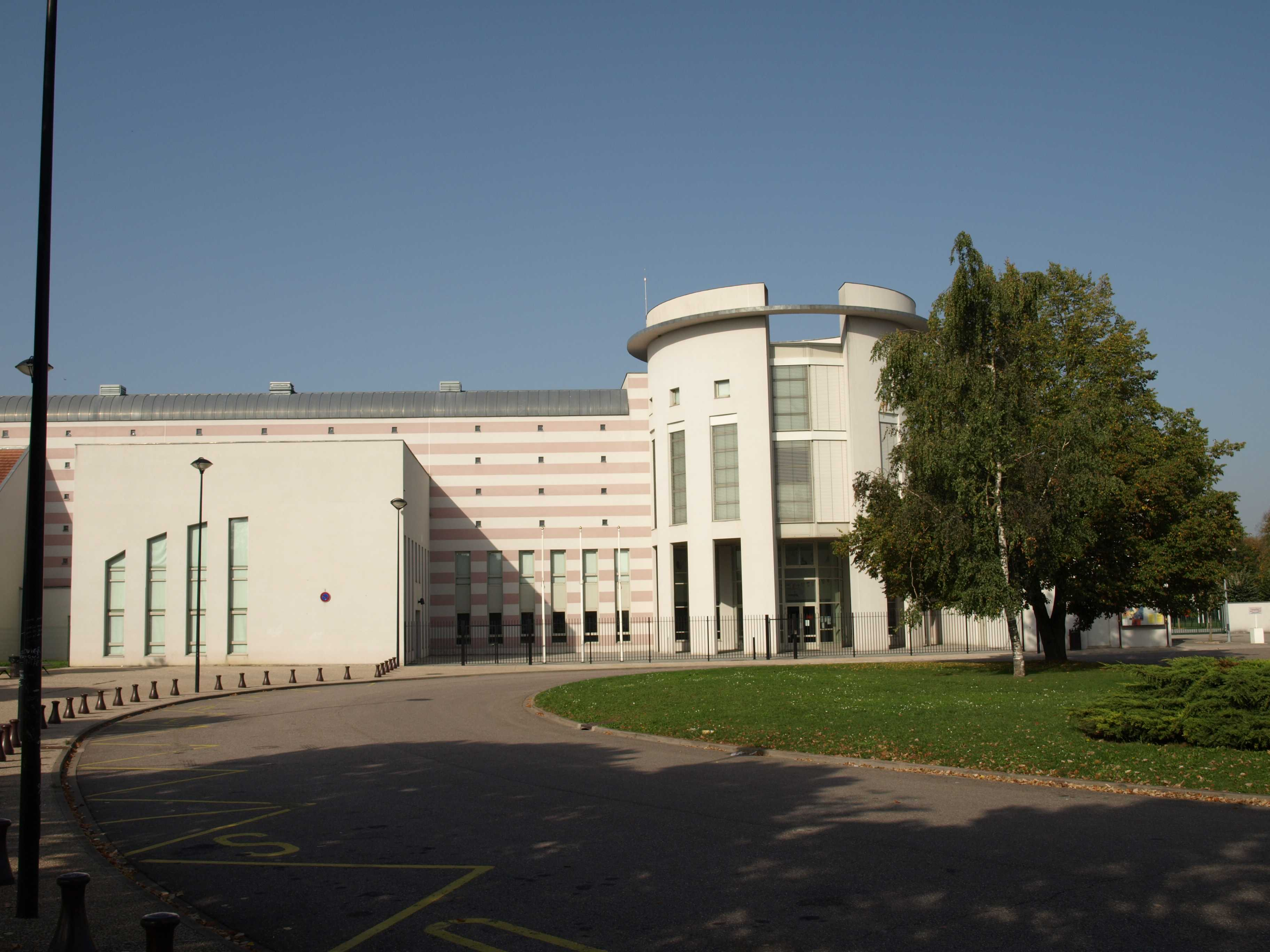 Vitry-le-François (51300 - FRANCE) : photographies Vitry-le-François (51300 - FRANCE) : Collège Les Indes (entrée)